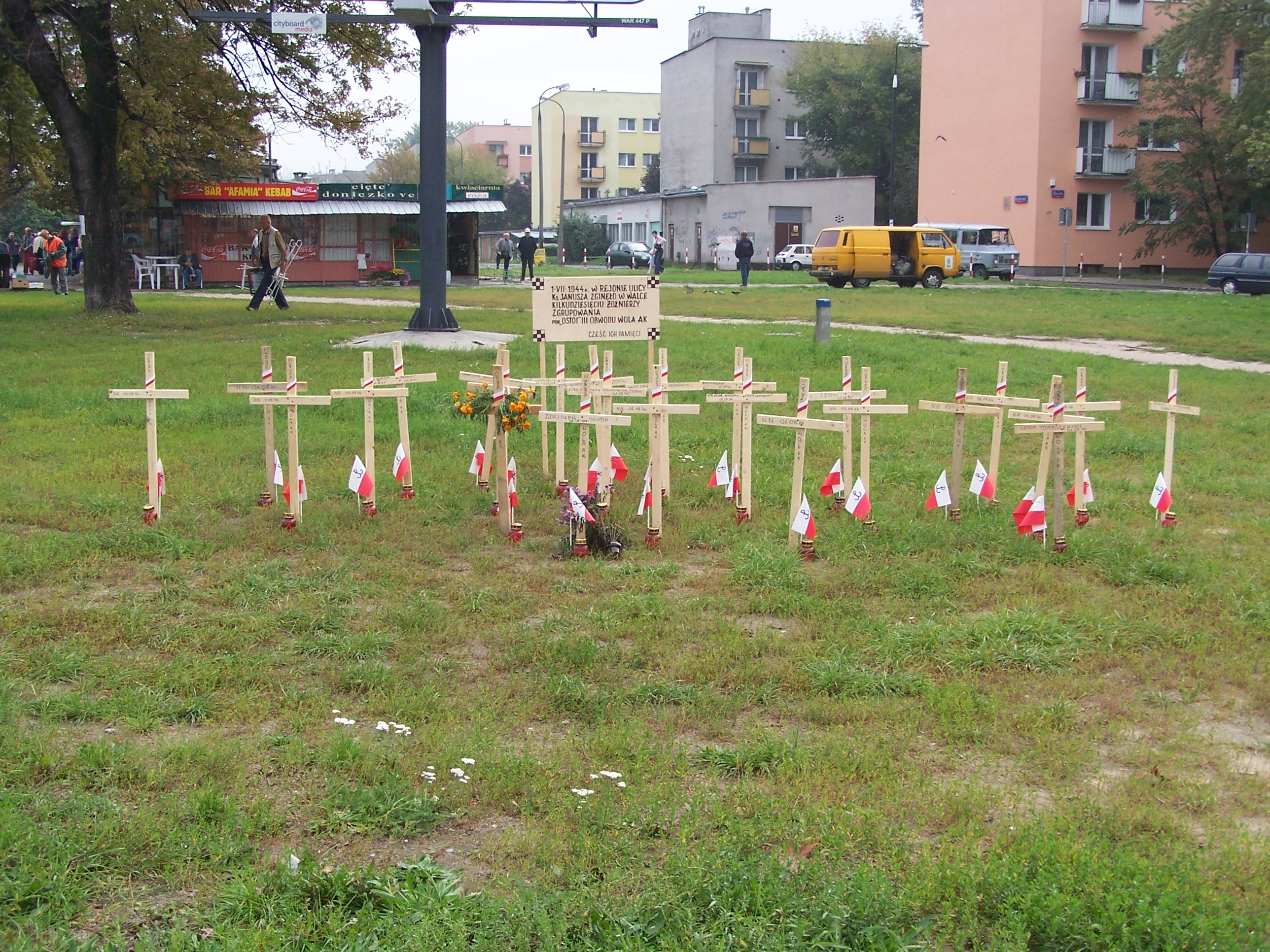 Krzyże upamiętniające poległych żołnierzy Armii Krajowej z oddziału ppor. Romualda Podwysockiego ps. "Ostoja" z Obwodu III Wola